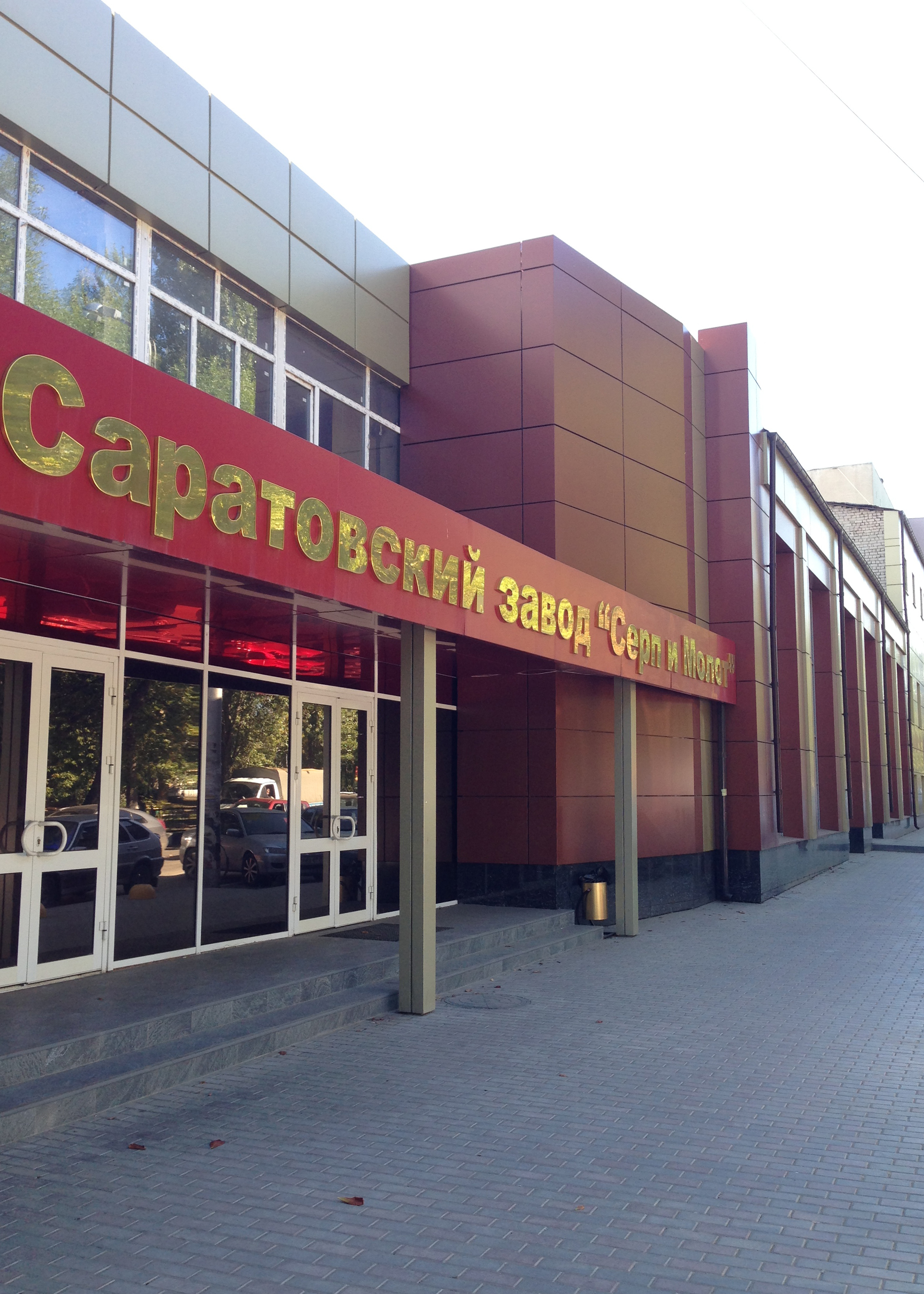 Саратовский завод «Серп и Молот», ул. Астраханская угол ул. Рабочая.